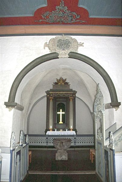 Sjørslev Kirke, Korbue og kor